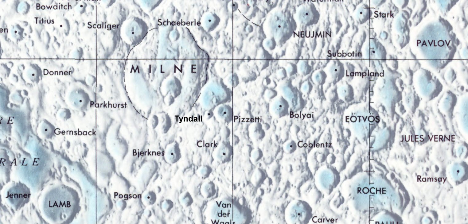 Cráter lunar Tyndall. Localización. (Lunar Chart LPC1. Second Edition)